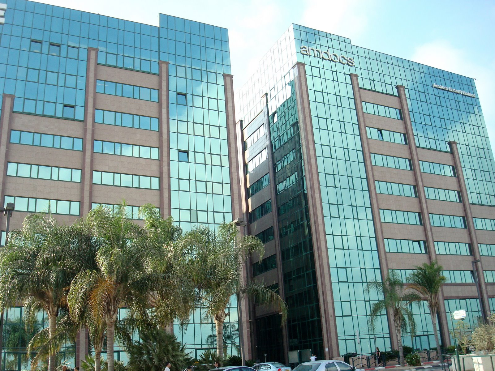 משרדי אמדוקס בצומת רעננה